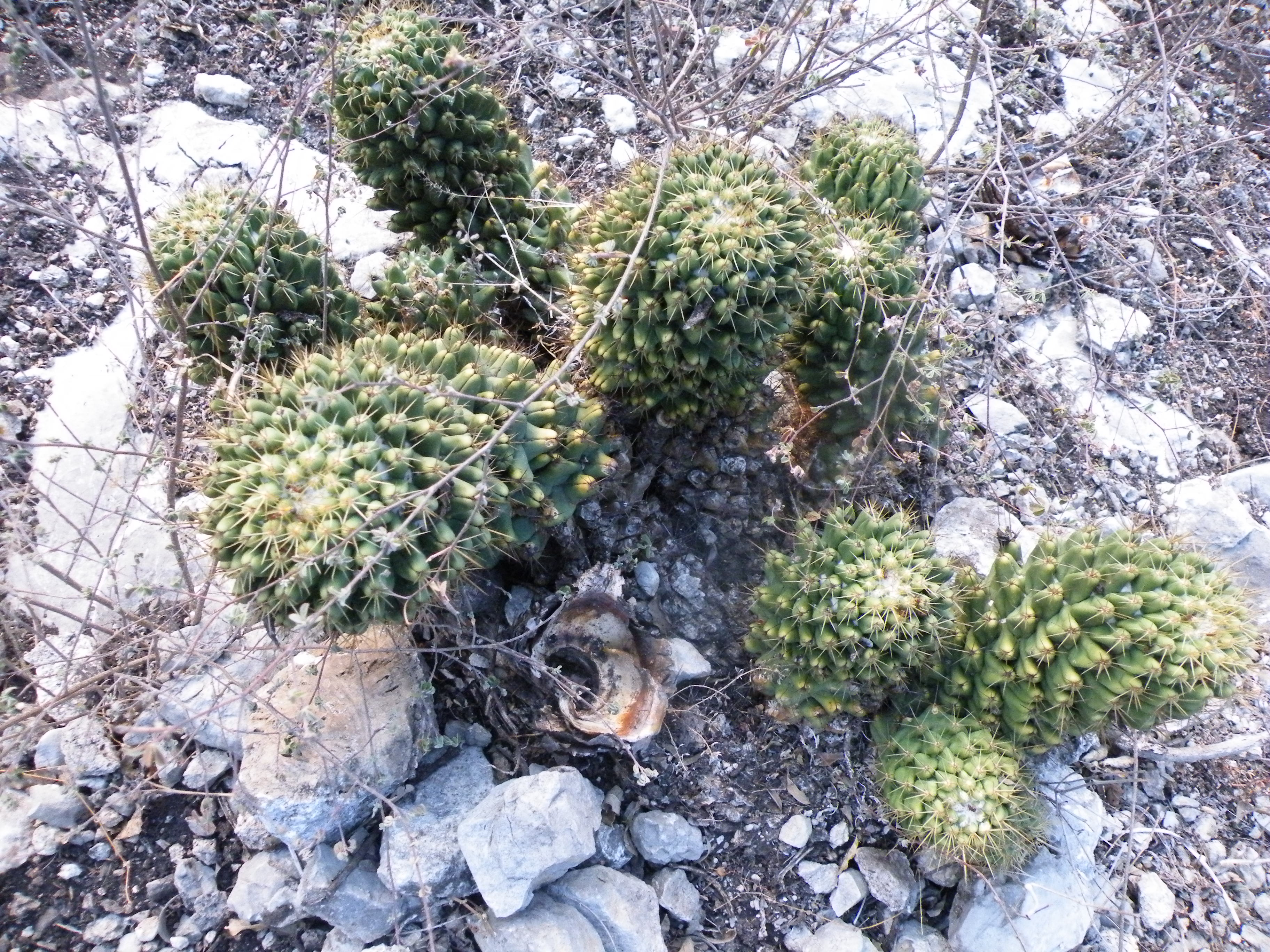 Gilo, Hidalgo